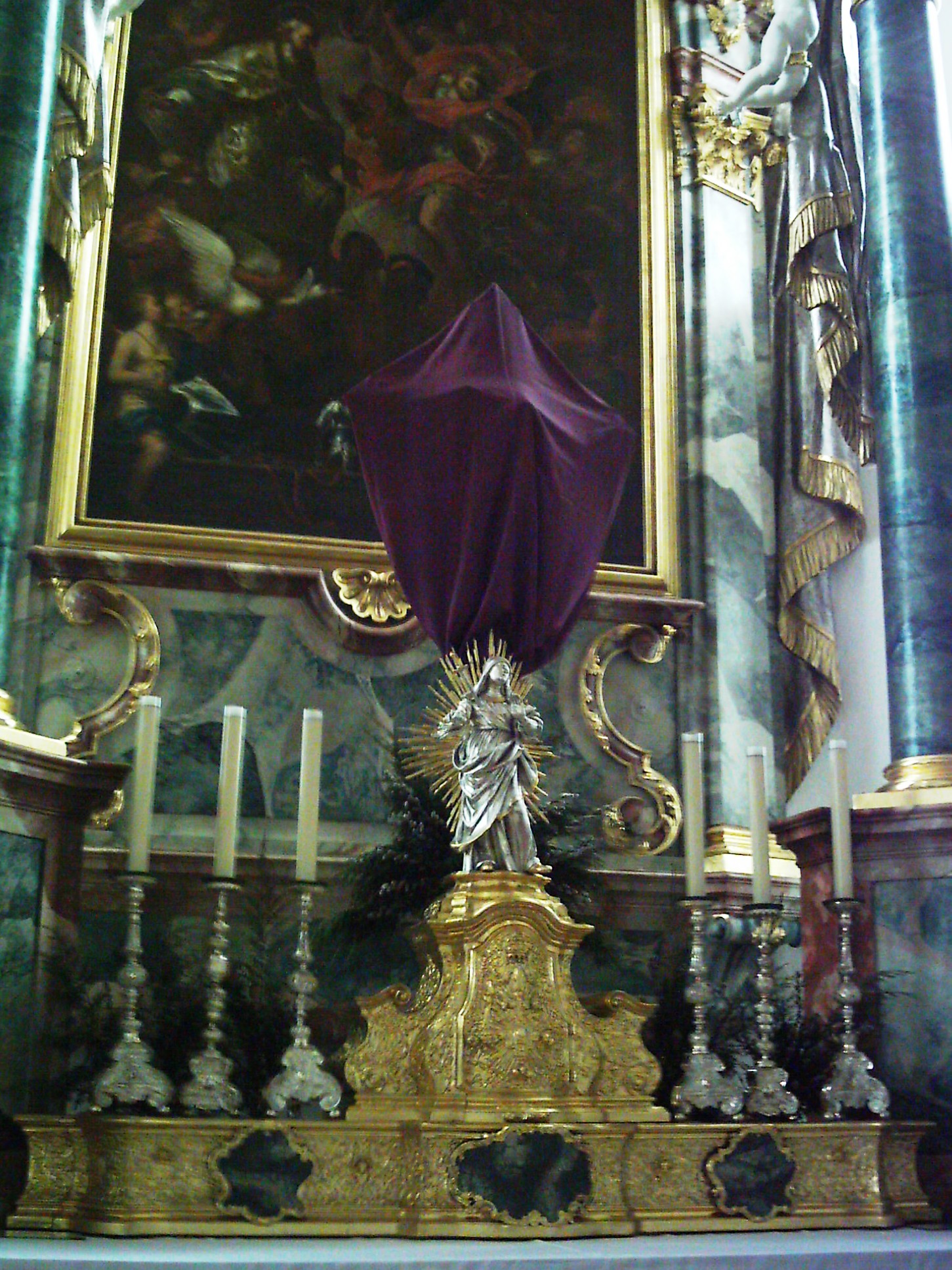 Verhülltes Kreuz während der Karwoche der röm.-kath. St. Martin in Tannheim (Württemberg), Baden Württemberg, Deutschland